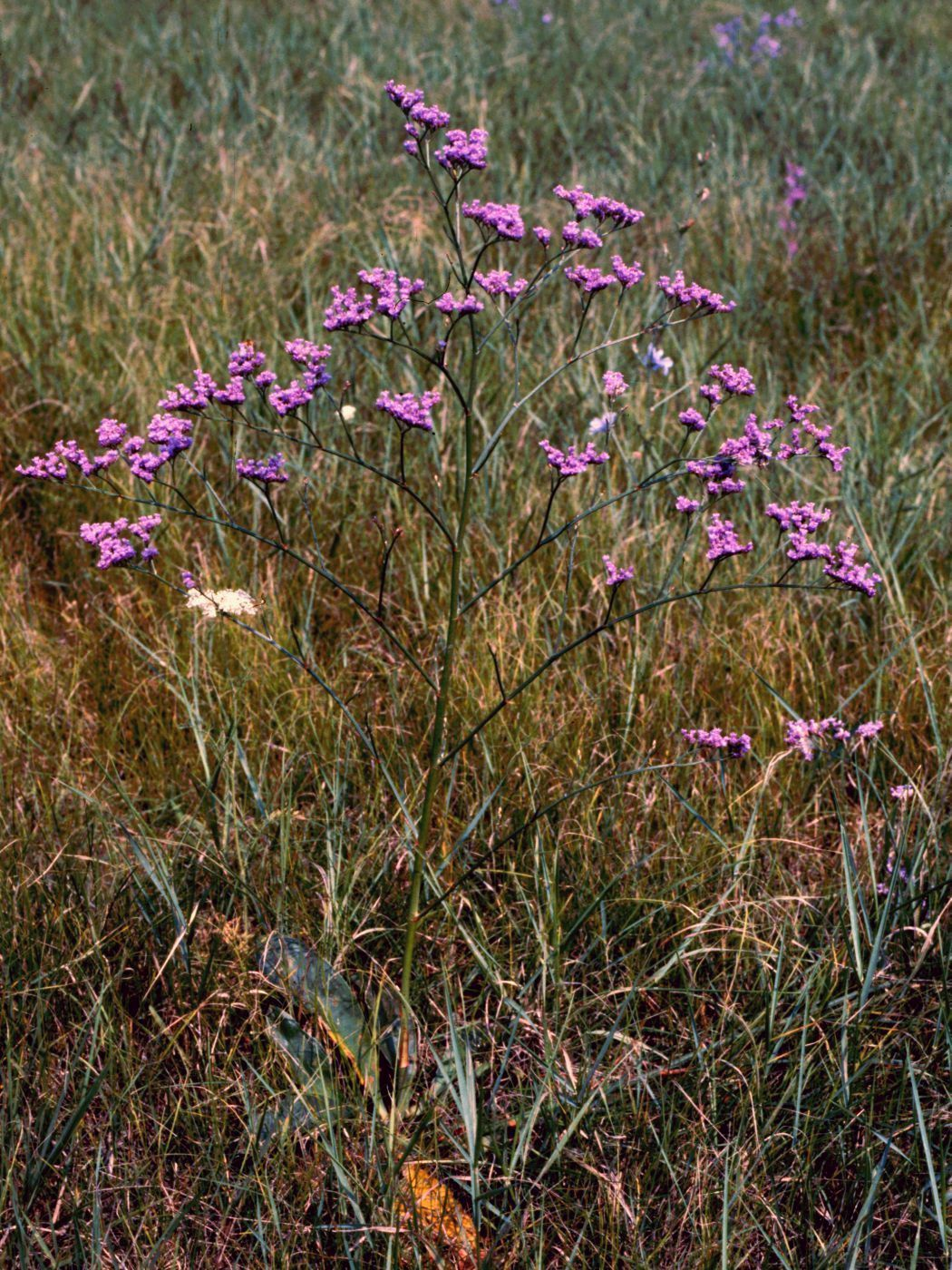 Limonium gmelinii, Bleiwurzgewächse (Plumbaginaceae) - Ungarn/Magyarország/Hungary: Alföld, bei Püspökládany